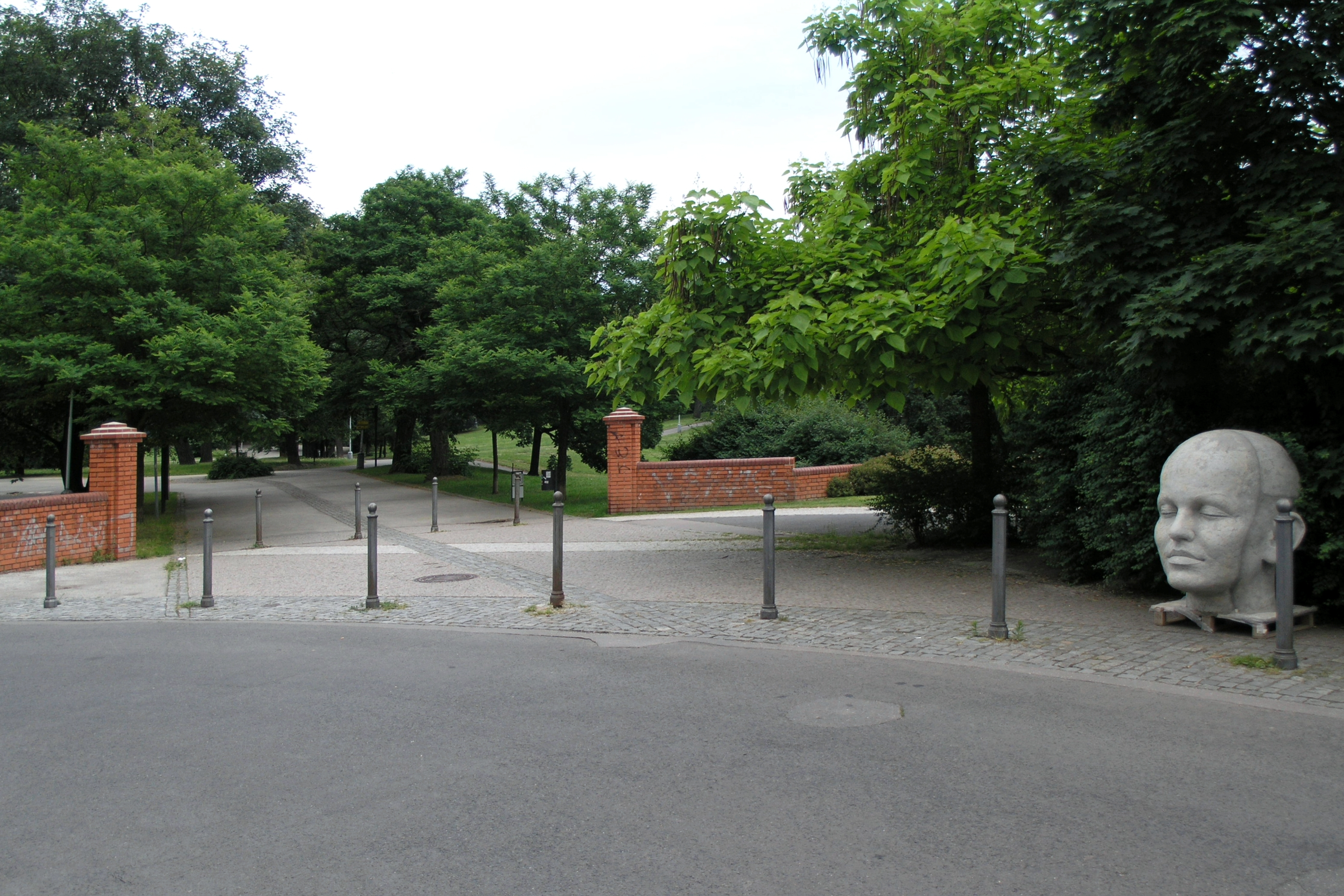 Praha, Hradčany - ulice Gogolova